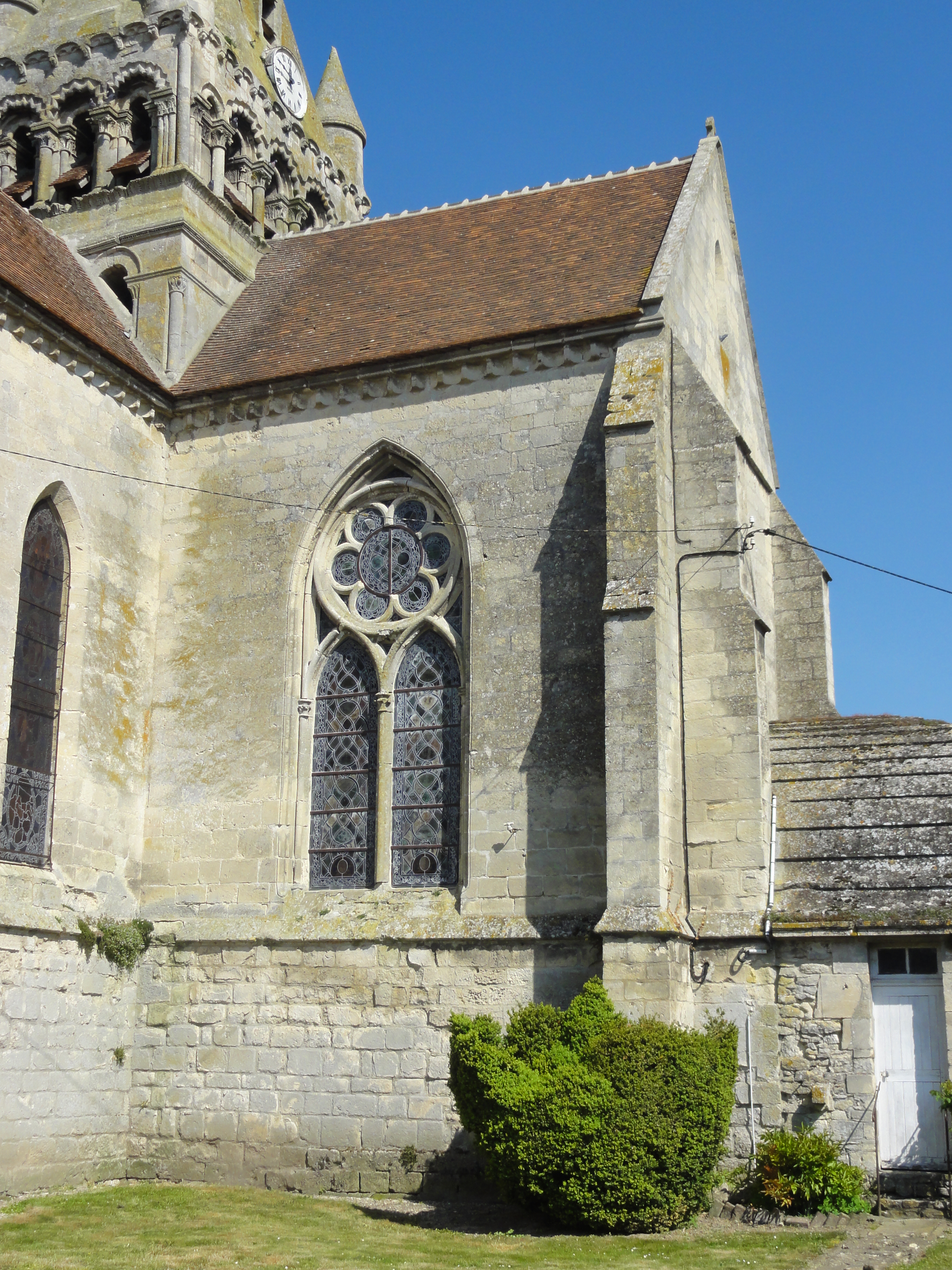 Chœur, vue depuis le sud.